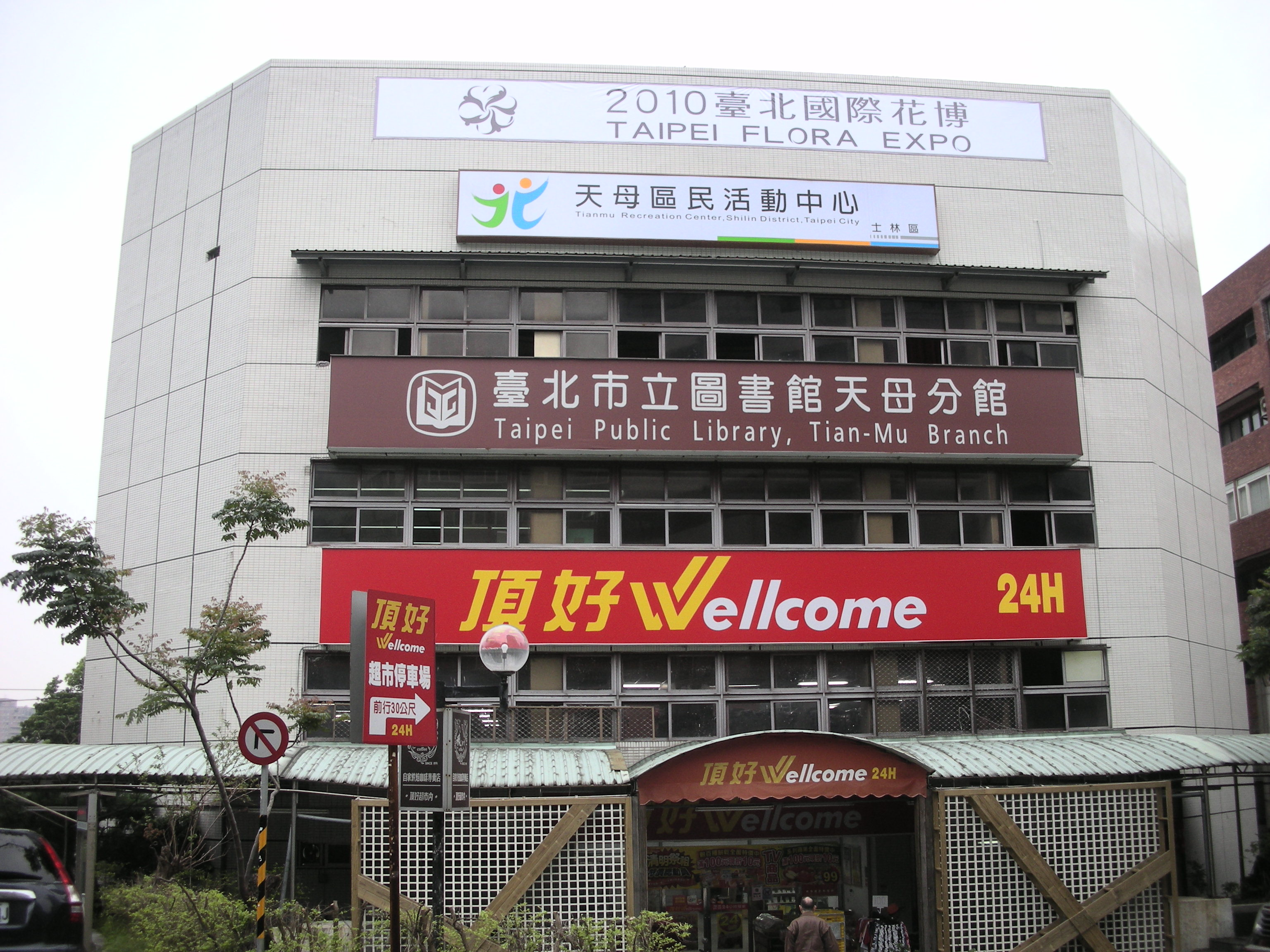 從天母聖安娜天主堂到天母圖書館